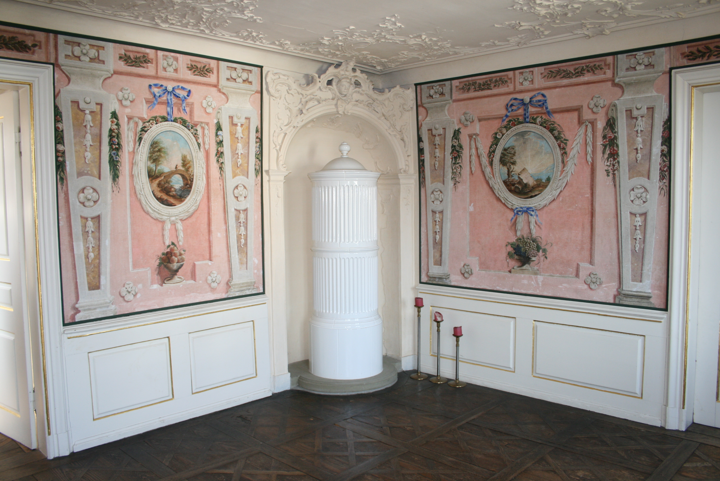 Pfedelbach, ehemaliger Witwensitz, heute Gasthaus Sonne. Salon mit Rocaille Stuck, Tafelparkett und barocken Landschaftstapeten